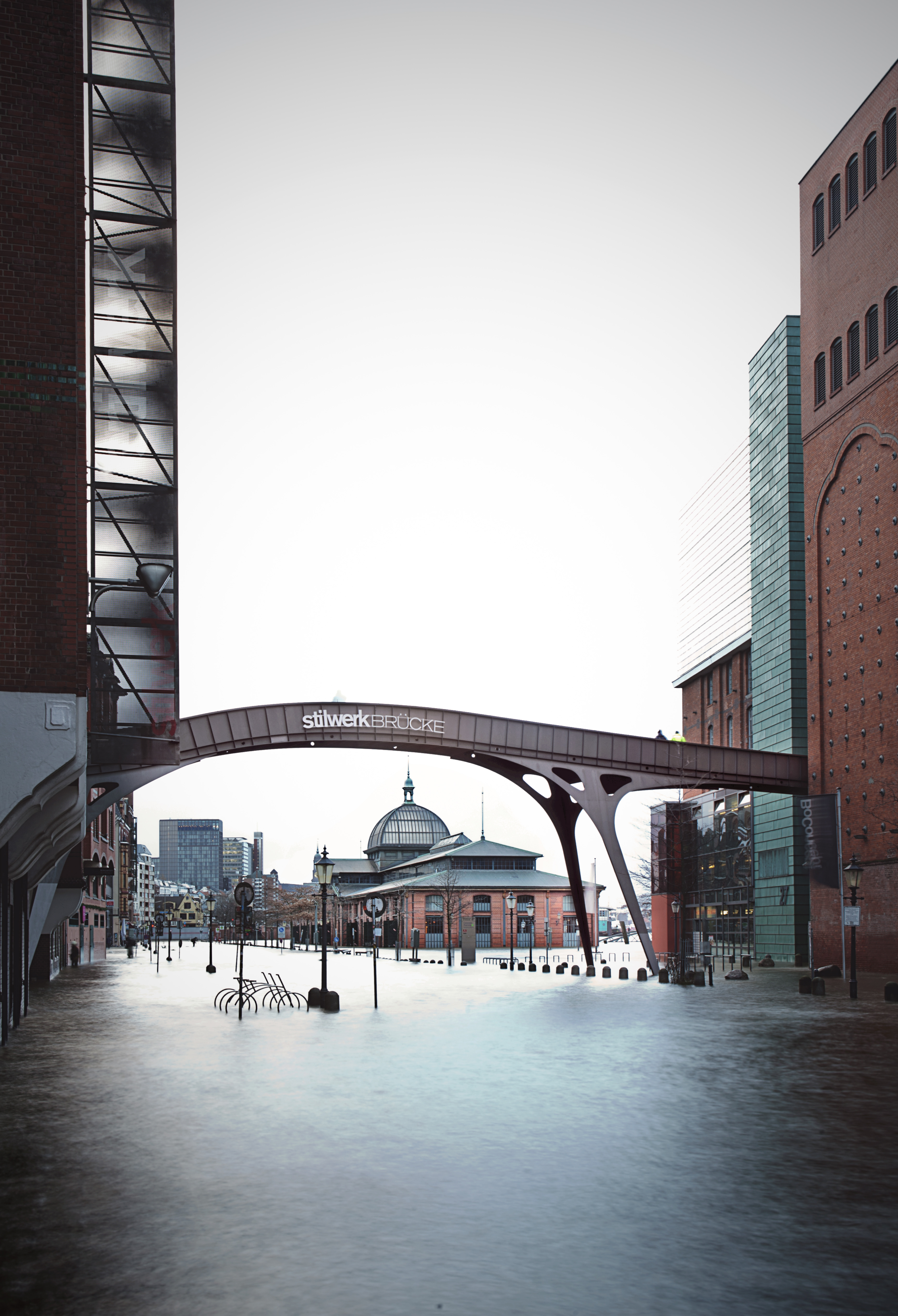 Hamburger Fischmarkt bei Hochwasser